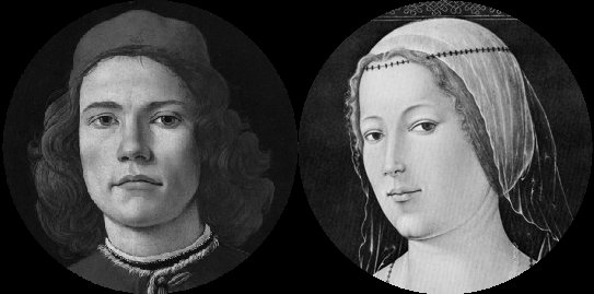 Carlo Sforza e Bianca Simonetta, primi Conti di Casteggio.